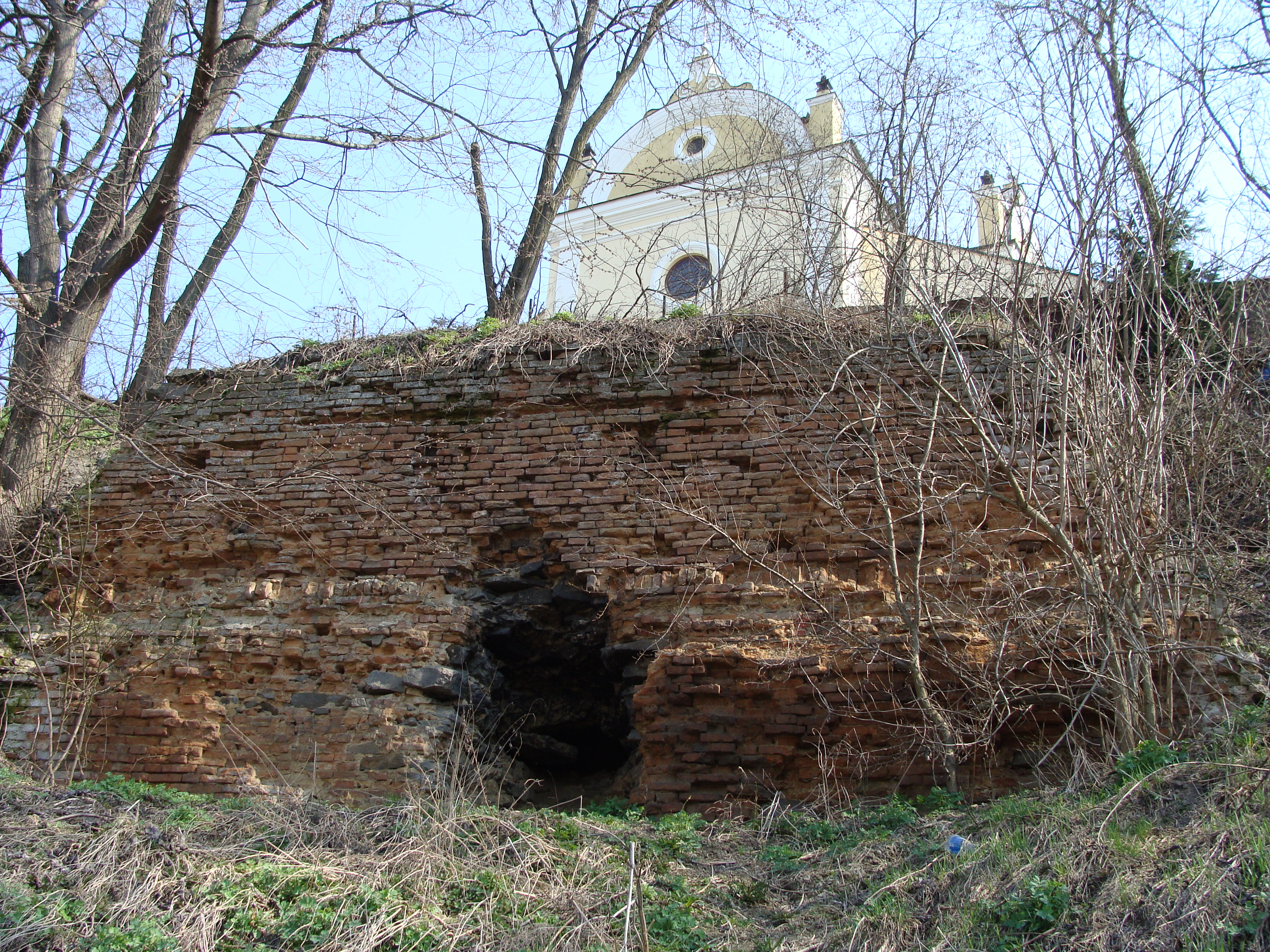 Полонська фортеця. Залишок ескарпової стіни південно-західного бастіону